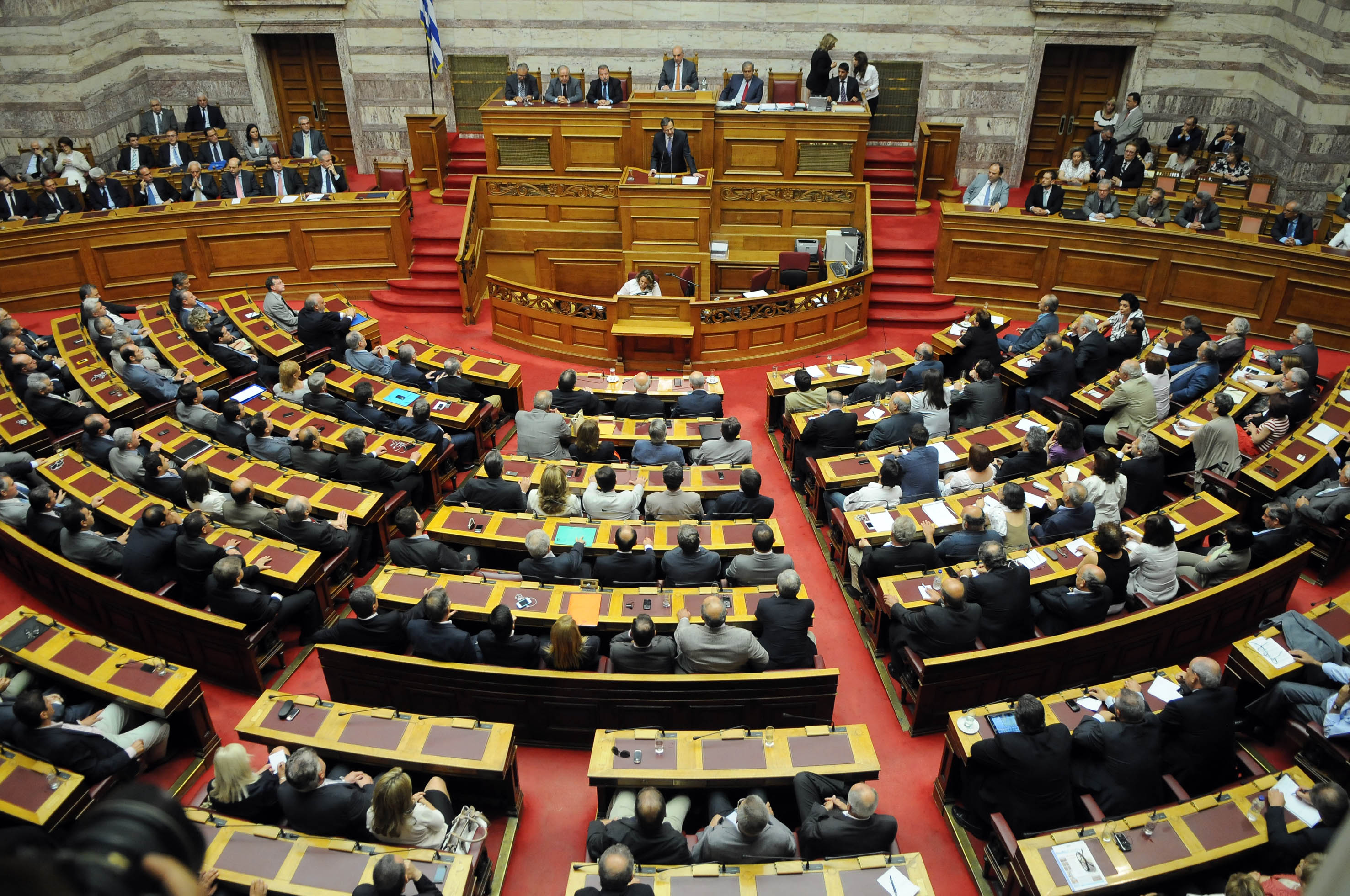 Αντώνης Σαμαράς - Ορκομωσία και Προγραμματικές Δηλώσεις